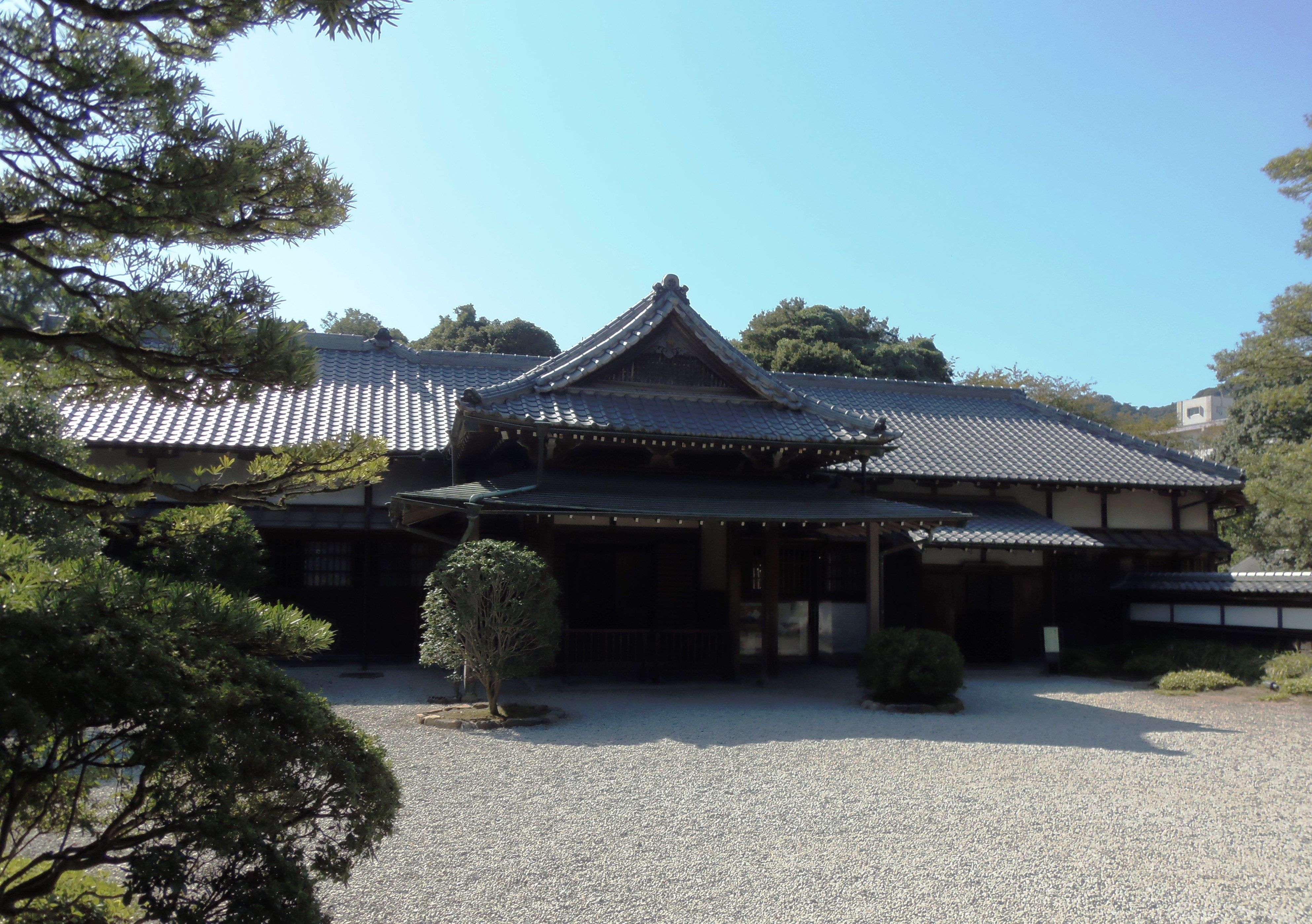 下関市の長府毛利邸建物正面外観です。